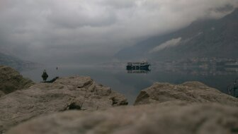 Karadağ'ın Kotor kentinde sahilden körfeze bakış.